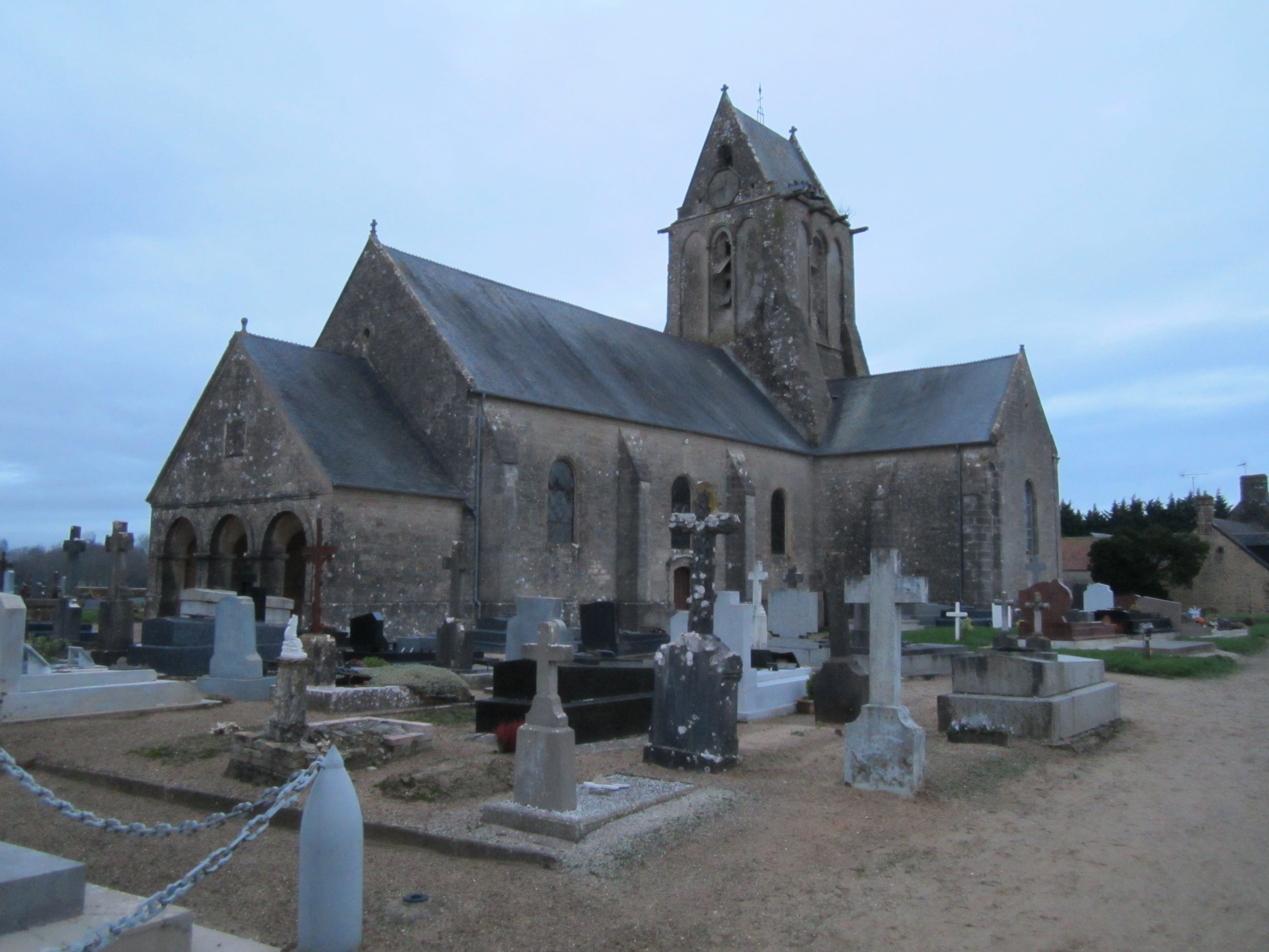 Église Saint-Martin de Fontenay-sur-Mer